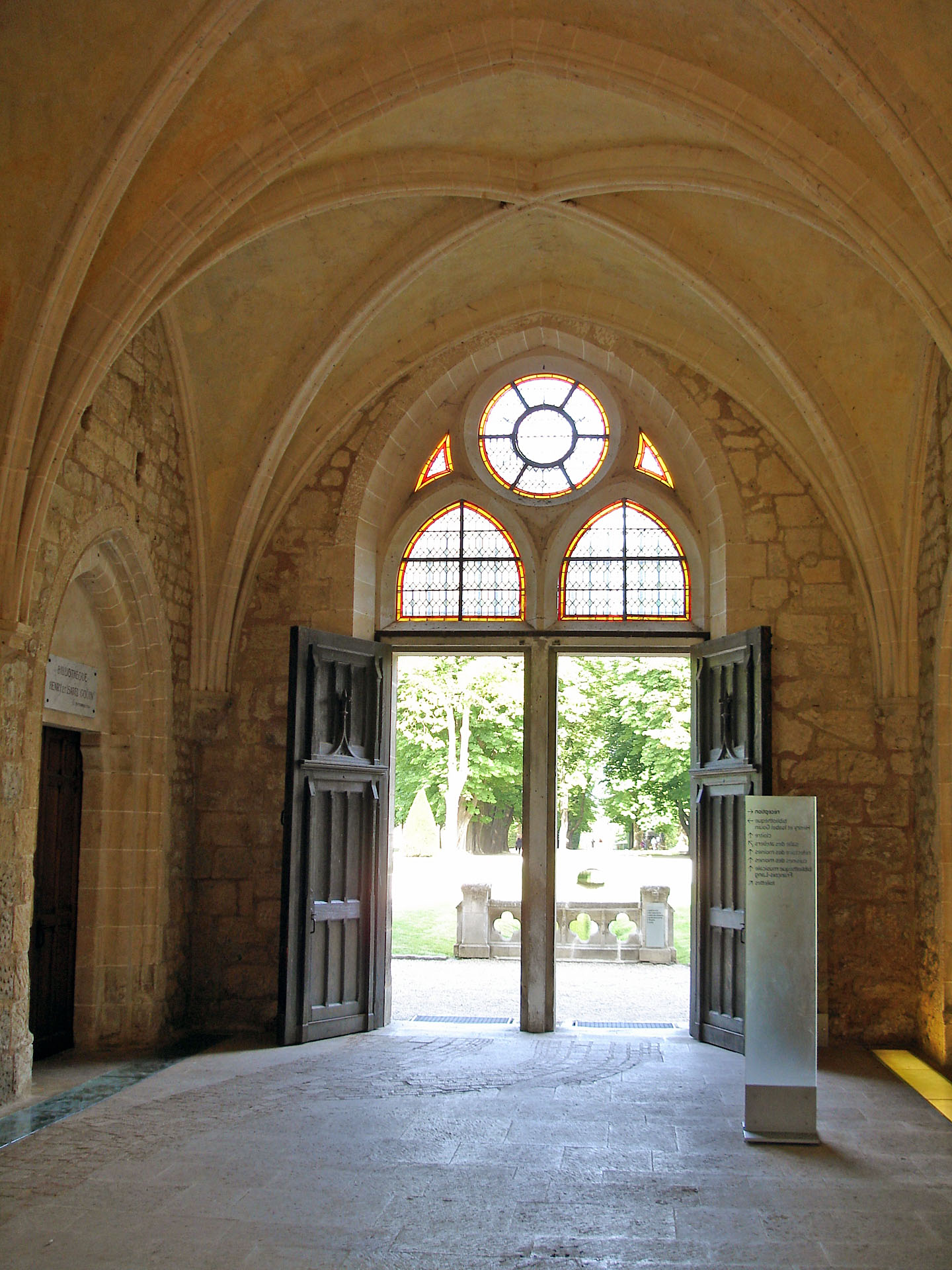 Le passage-parloir de l'abbaye de Royaumont, Val-d'Oise, France.